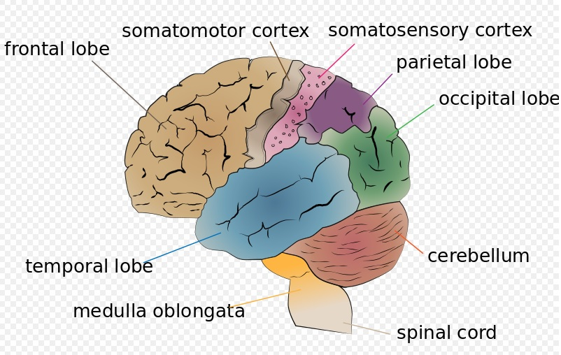 Cerebro